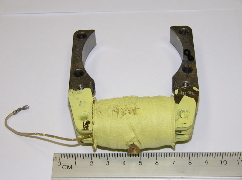 Магнето Д6 применяемое на двигателях Д6, Д8.